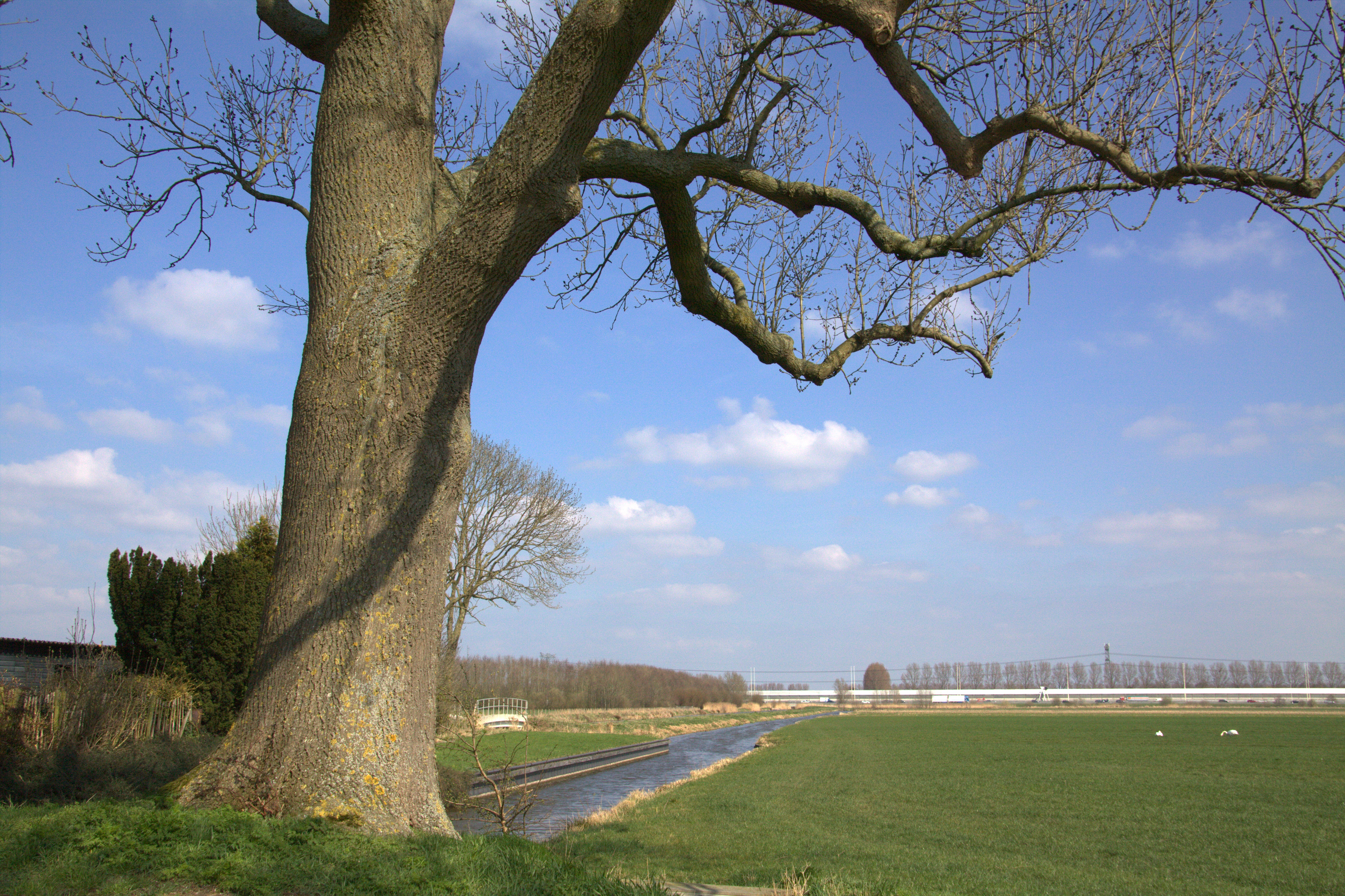 De Haarrijn gaat hier richting de A 2 en "duikt" daar onder de weg door richting het Amsterdam-Rijnkanaal. De Haarrijn en het gemaal zijn het noordelijkste puntje van de Gemeente Utrecht.